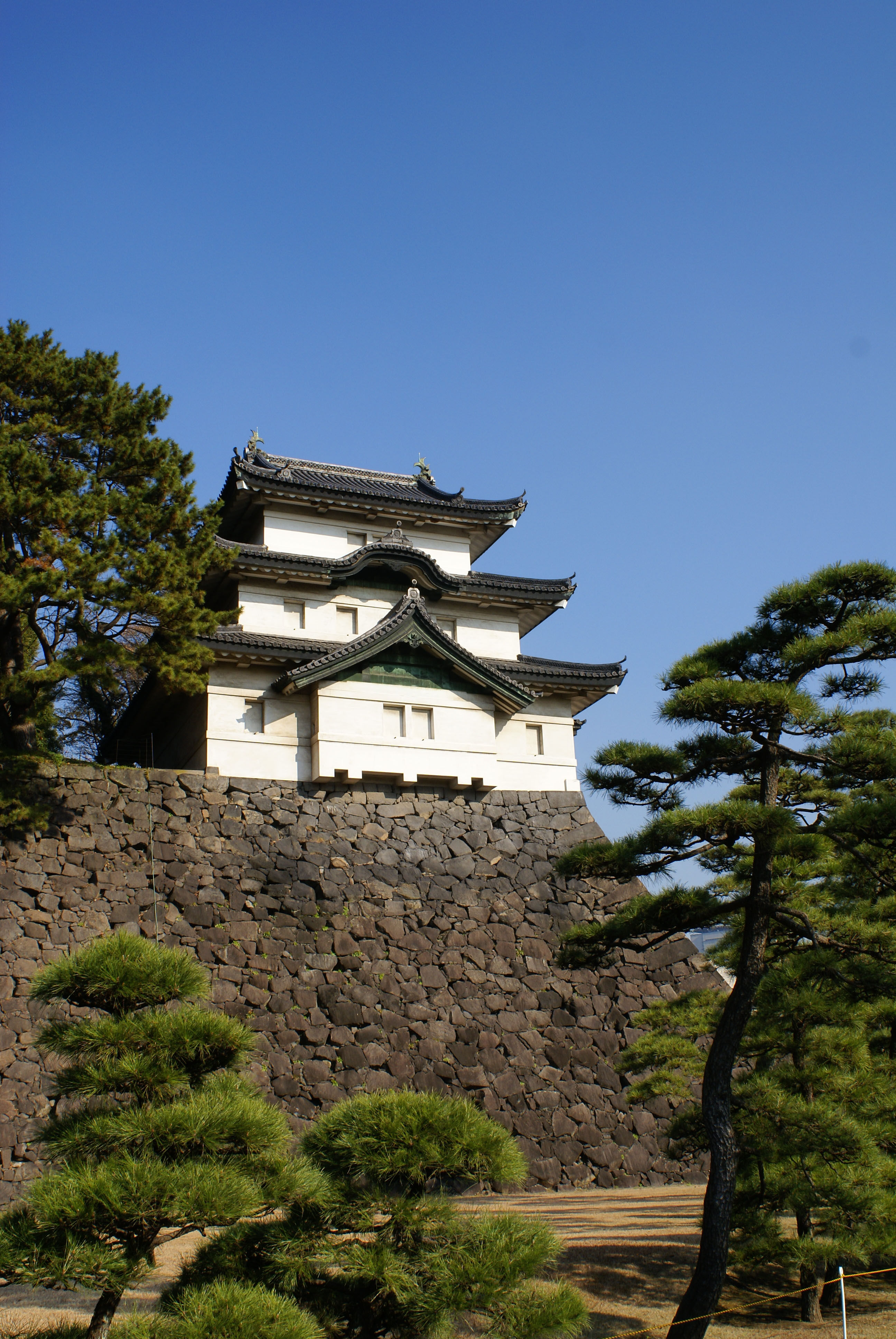 江戸城の富士見櫓